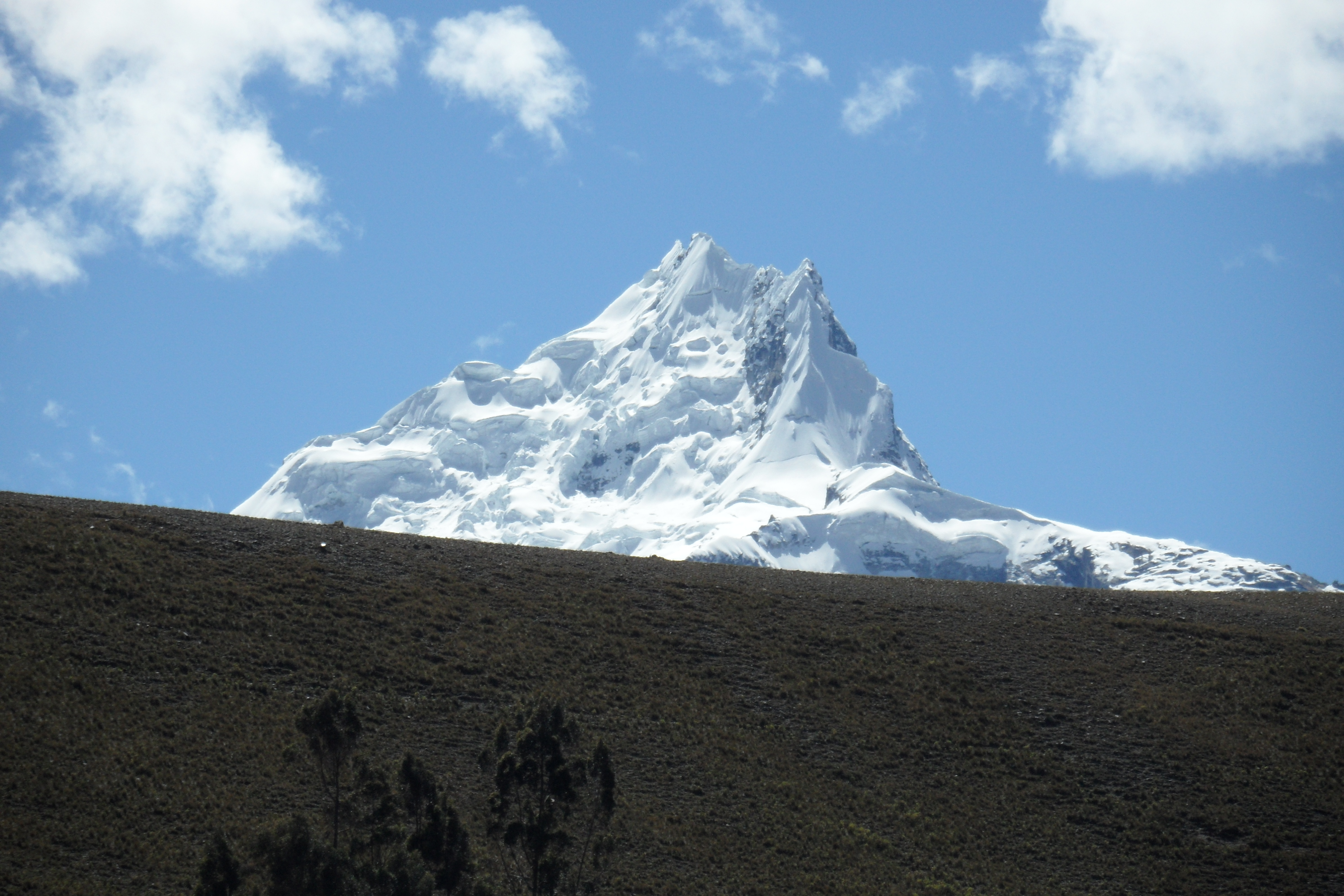 Foto tomada el 2011 en el distrito de Ollero, provincia de Huaraz, Cordillera Blanca, Áncash - Perú.